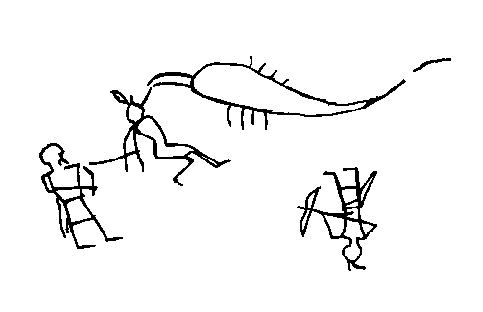 Felsritzung aus Gebel Sheik Suleiman